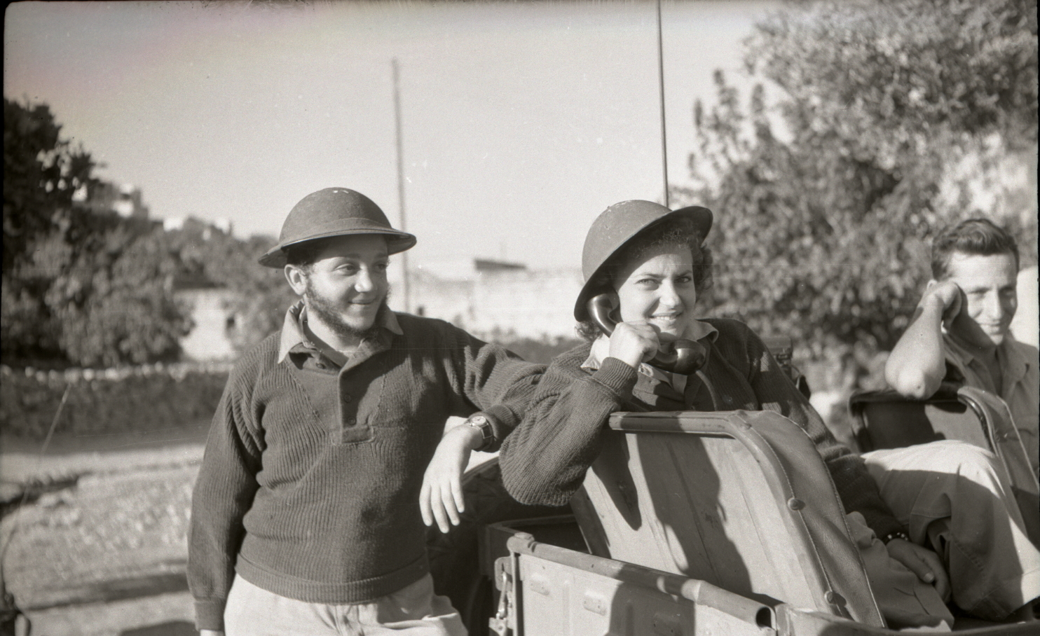 צריפין סרפנד כיבוש הבסיס 1948 1 צלם בנו רותנברג גנזך המדינה